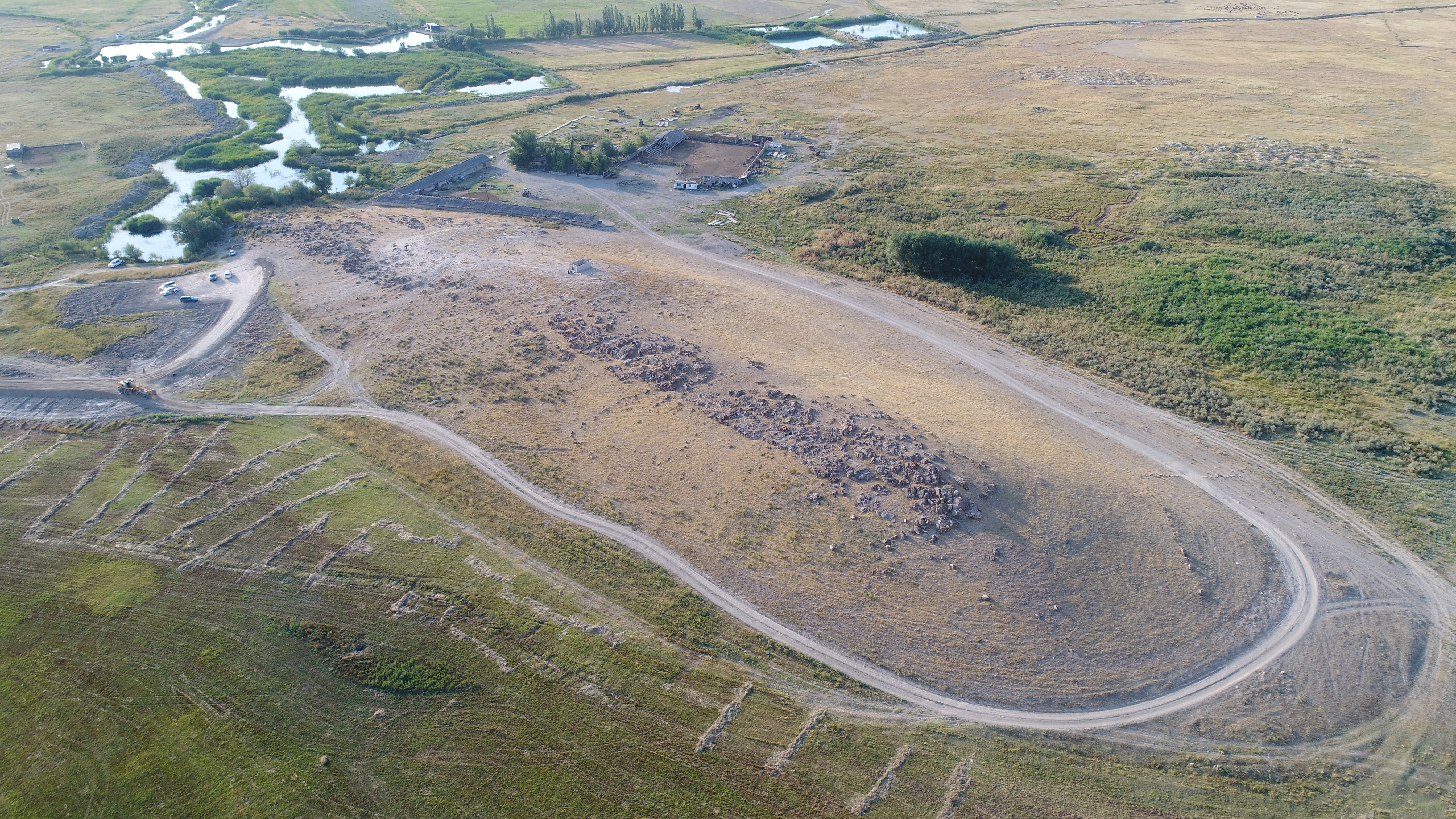 Қазақстанның киелі орындарының бірі